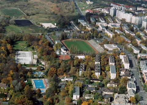 Tatabánya, Hungary, aerialphotography